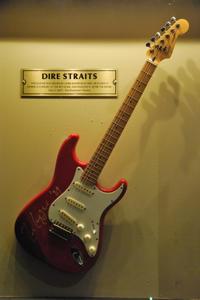 Dire Straits' Guitar @ blues bar, Chicago “THIS GUITAR WAS SIGNED BY MARK KNOPFLER IN 1989. HE PLAYED IT DURING A CONCERT AT THE SKY DOME, AND DONATED IT AFTER THE SHOW. May 5, 2001 - The Rosemont Theater” CámaraNikon D60 Exposición0,1 sec (1/10) Aperturef/4.8 Lente38 mm Lente37.8 mm Velocidad ISO1600 Tendencia de exposición0 EV